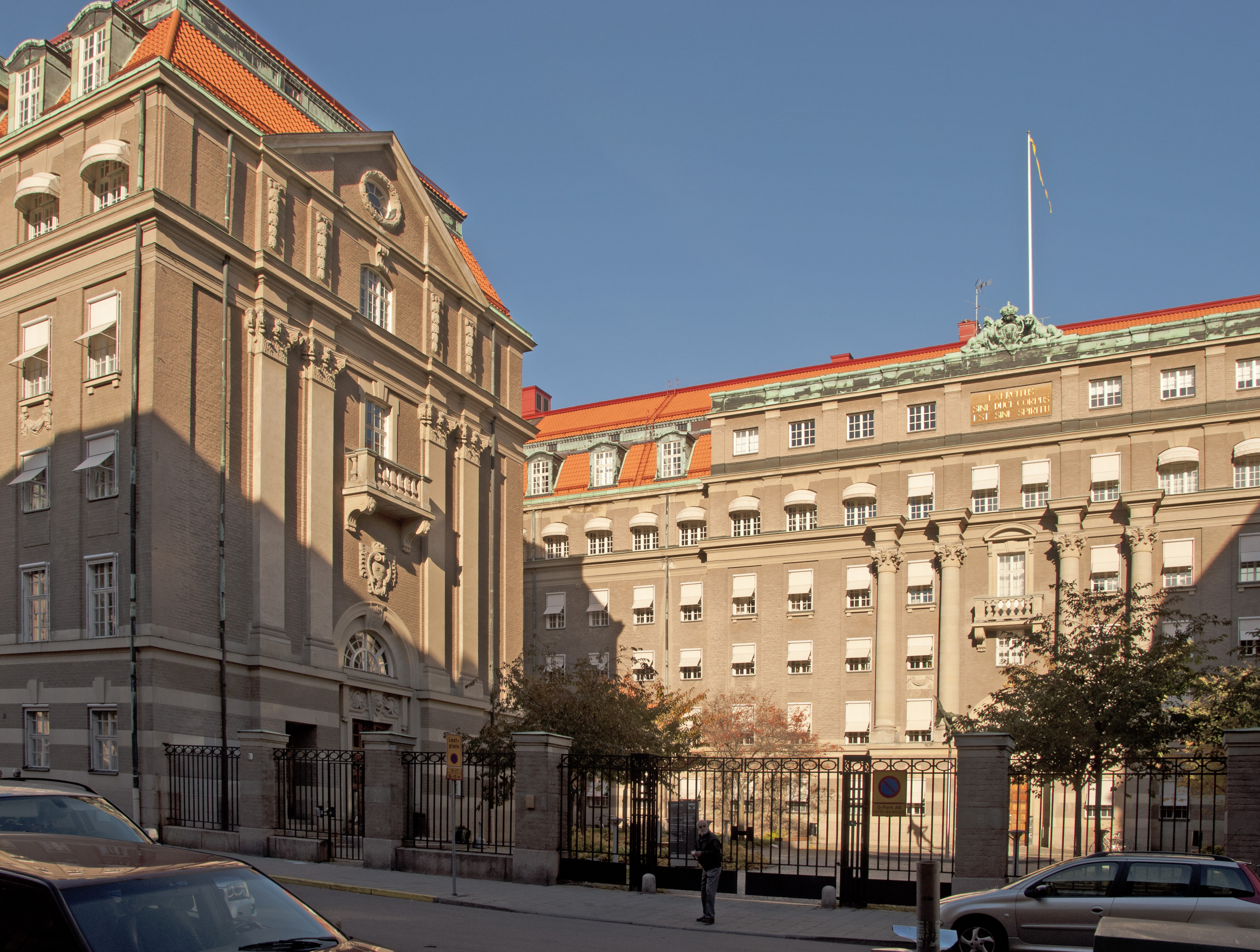 Östermalmsgatan 87, Gamla Militärstadbsbygganden